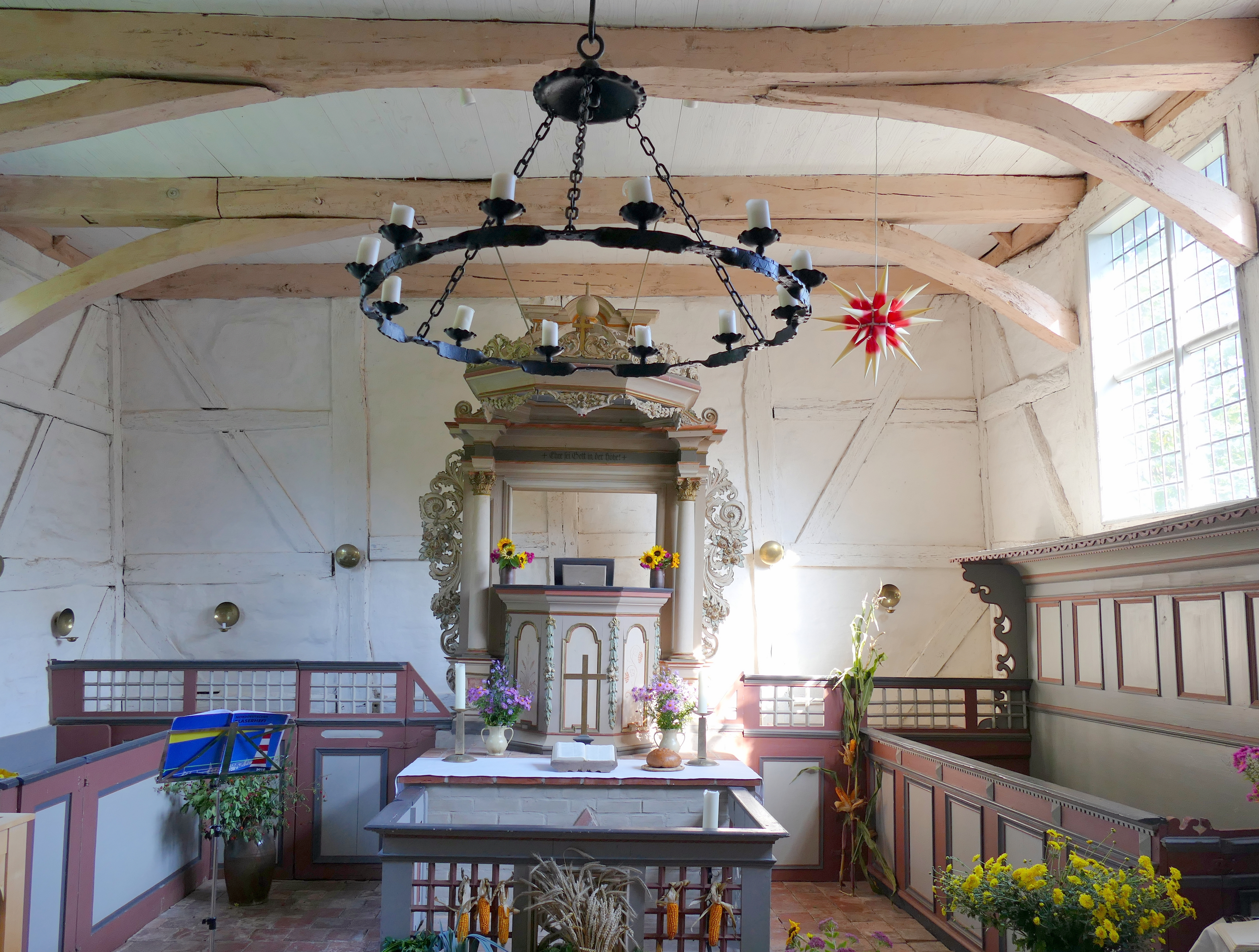 Kirche Klempenow, Altar mit Gehege, seitlich Patronatsgestühl